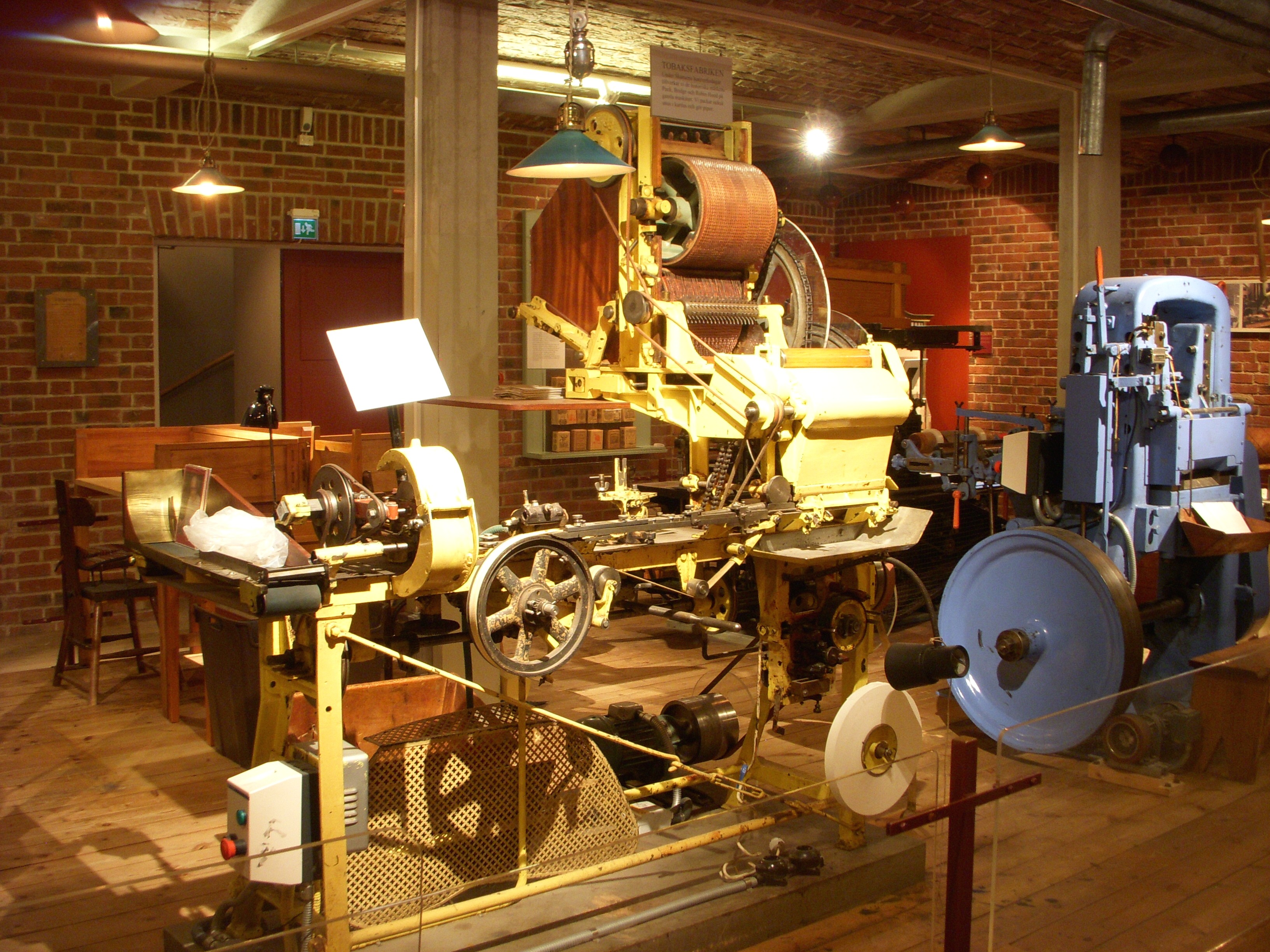 Cigarett-tillverkningsmaskin i Tobaksmuseet, Gubbhyllan på Skansen